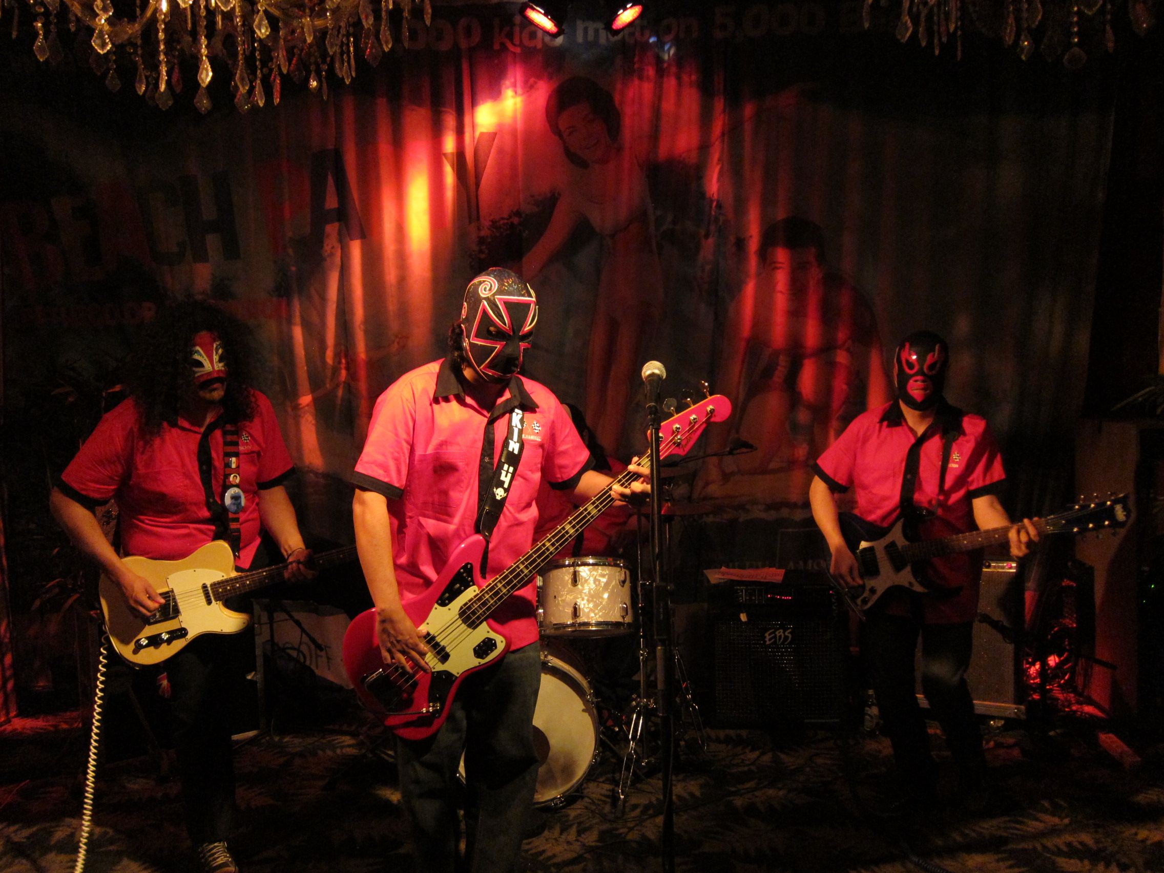 Lost Acapulco, Kokomo, Helsinki, 18 de agosto de 2011.